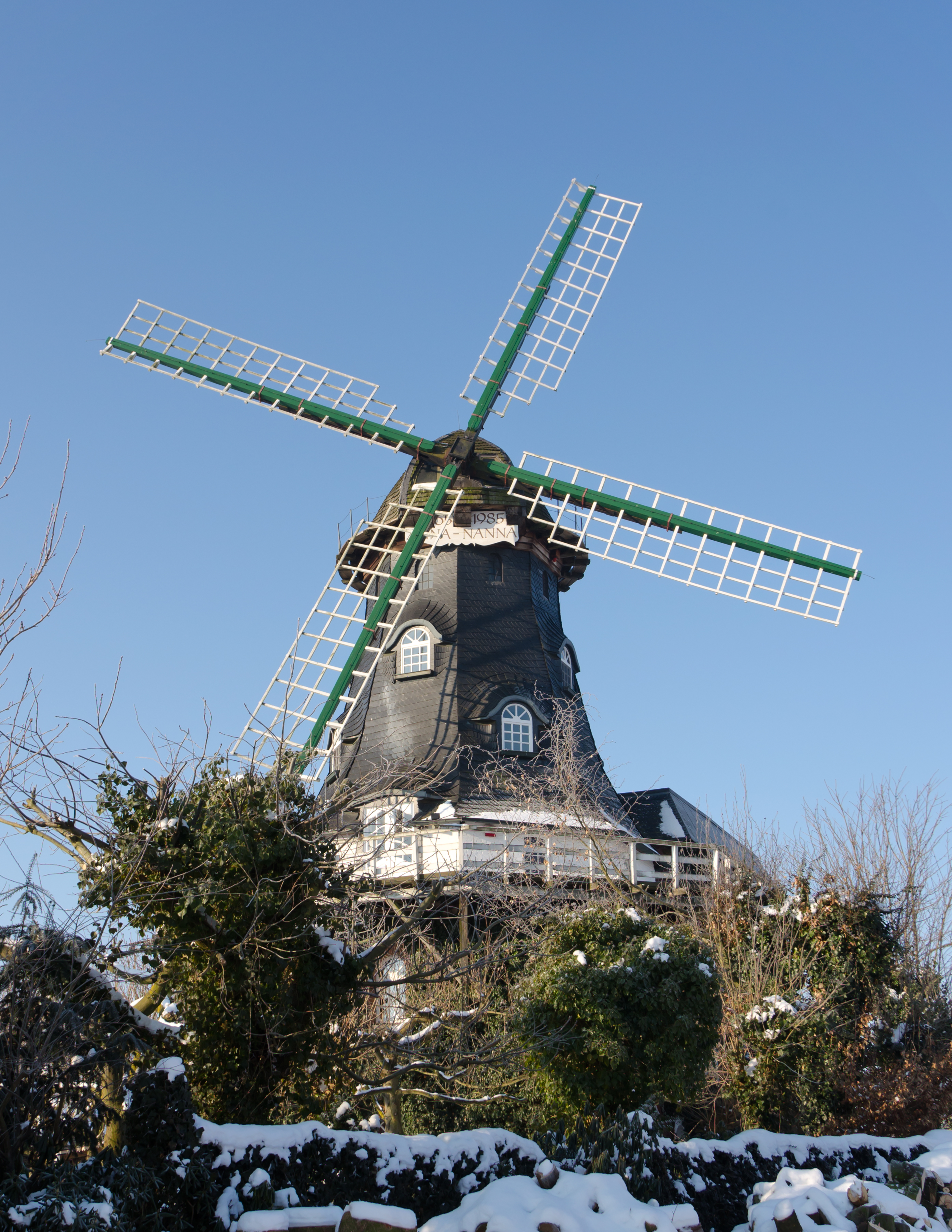 Garlstorfer Mühle